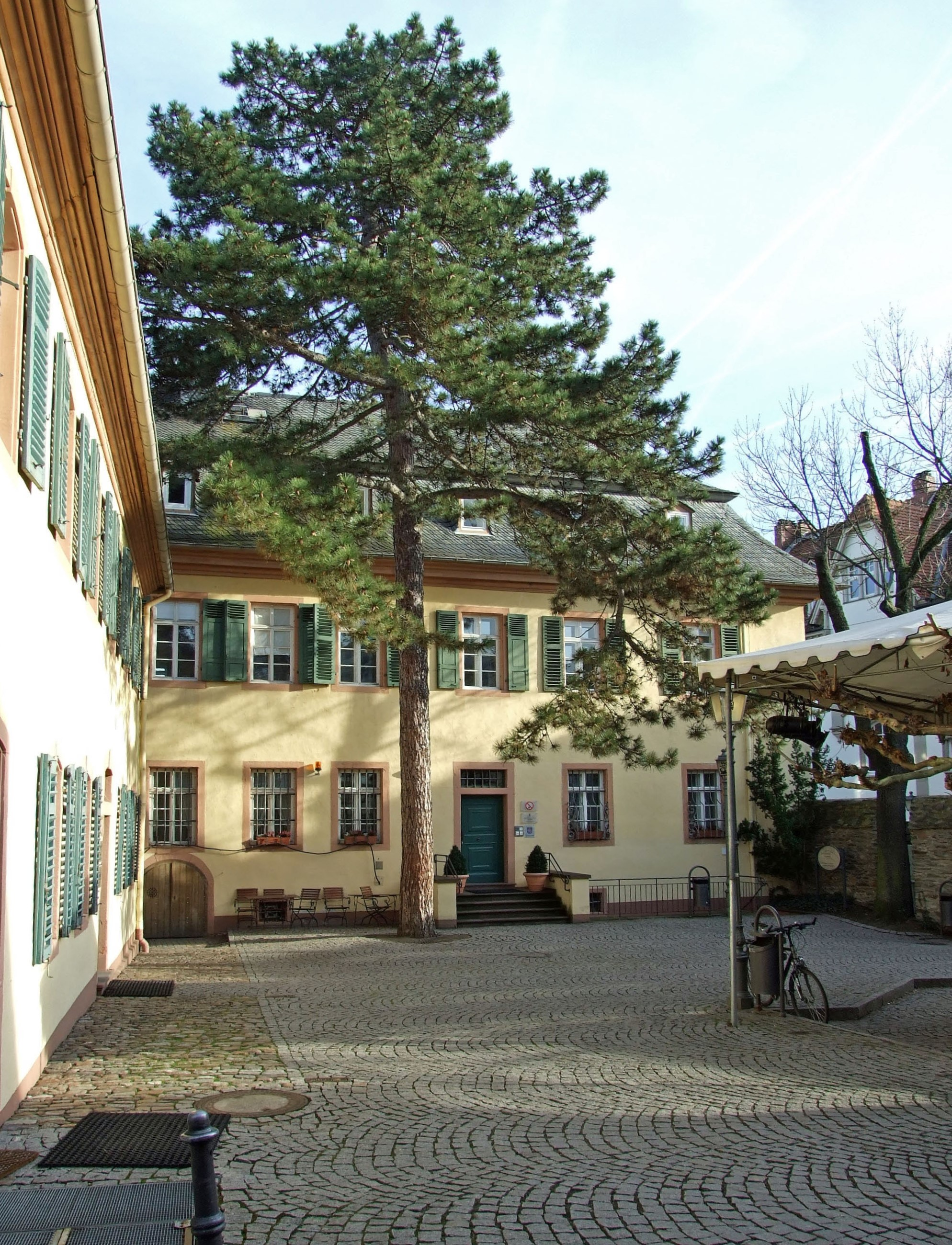 „Receptur“ in Kronberg